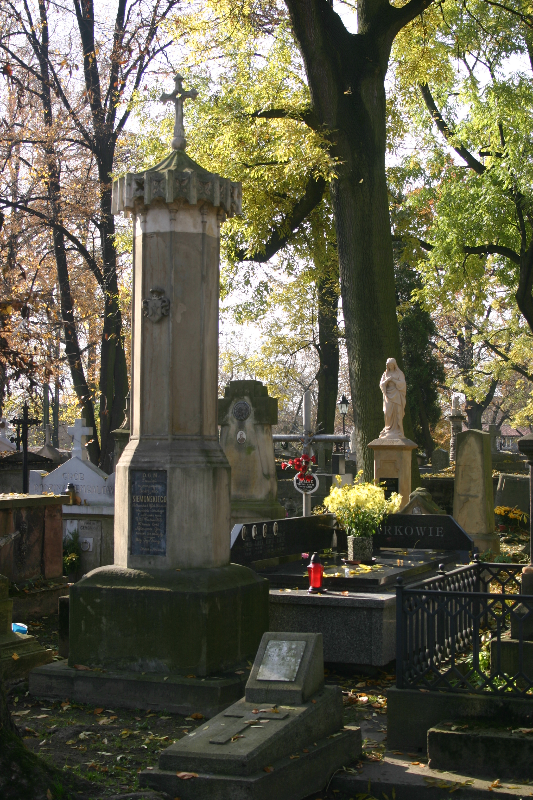 Nagrobek Gabriela Tadeusza Siemońskiego na Starym Cmentarzu w Tarnowie. Pomnik znajduje się przy XVII kwaterze.